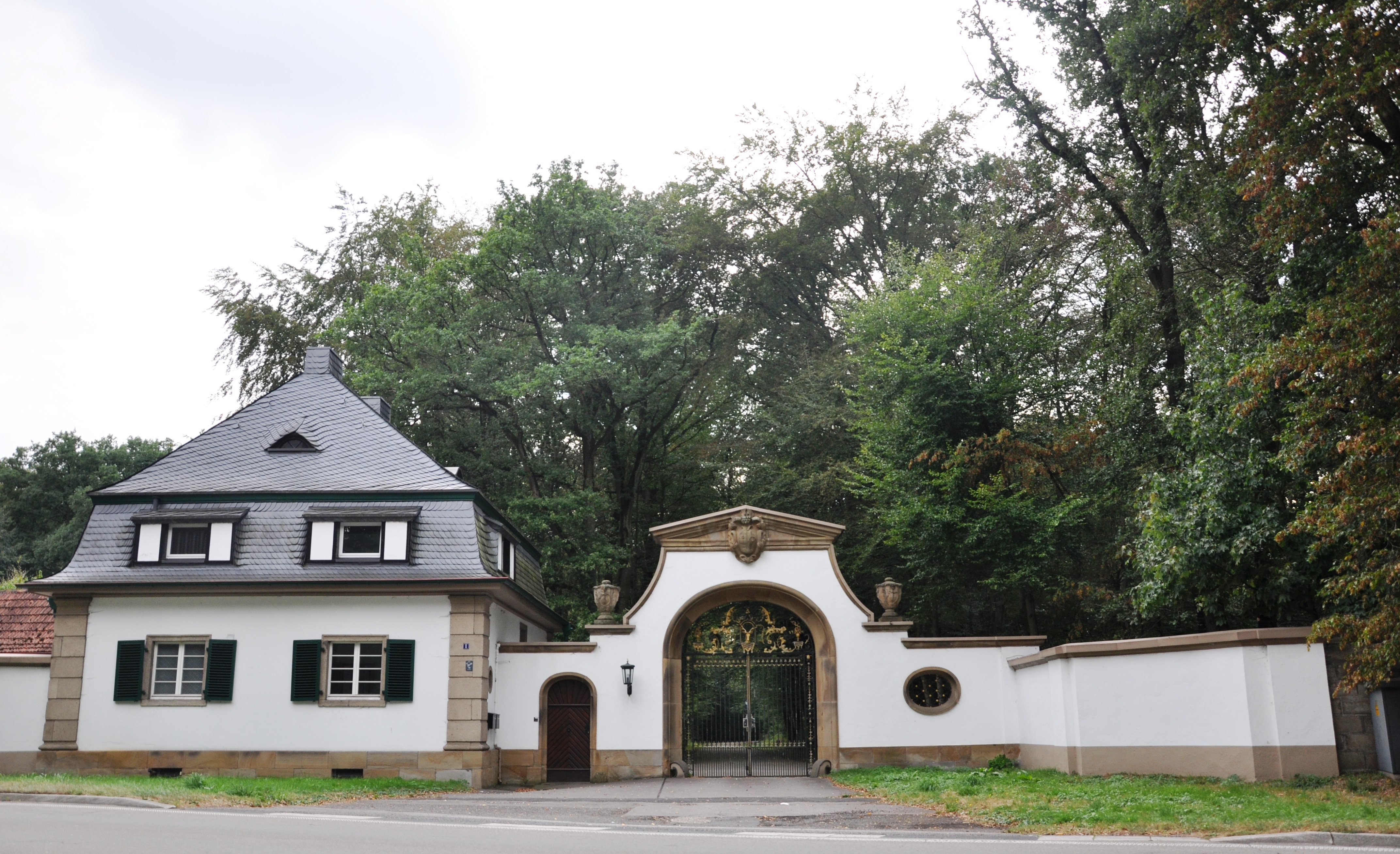 Mauer von Schloss Röttgen, Tor Heumarer Mauspfad